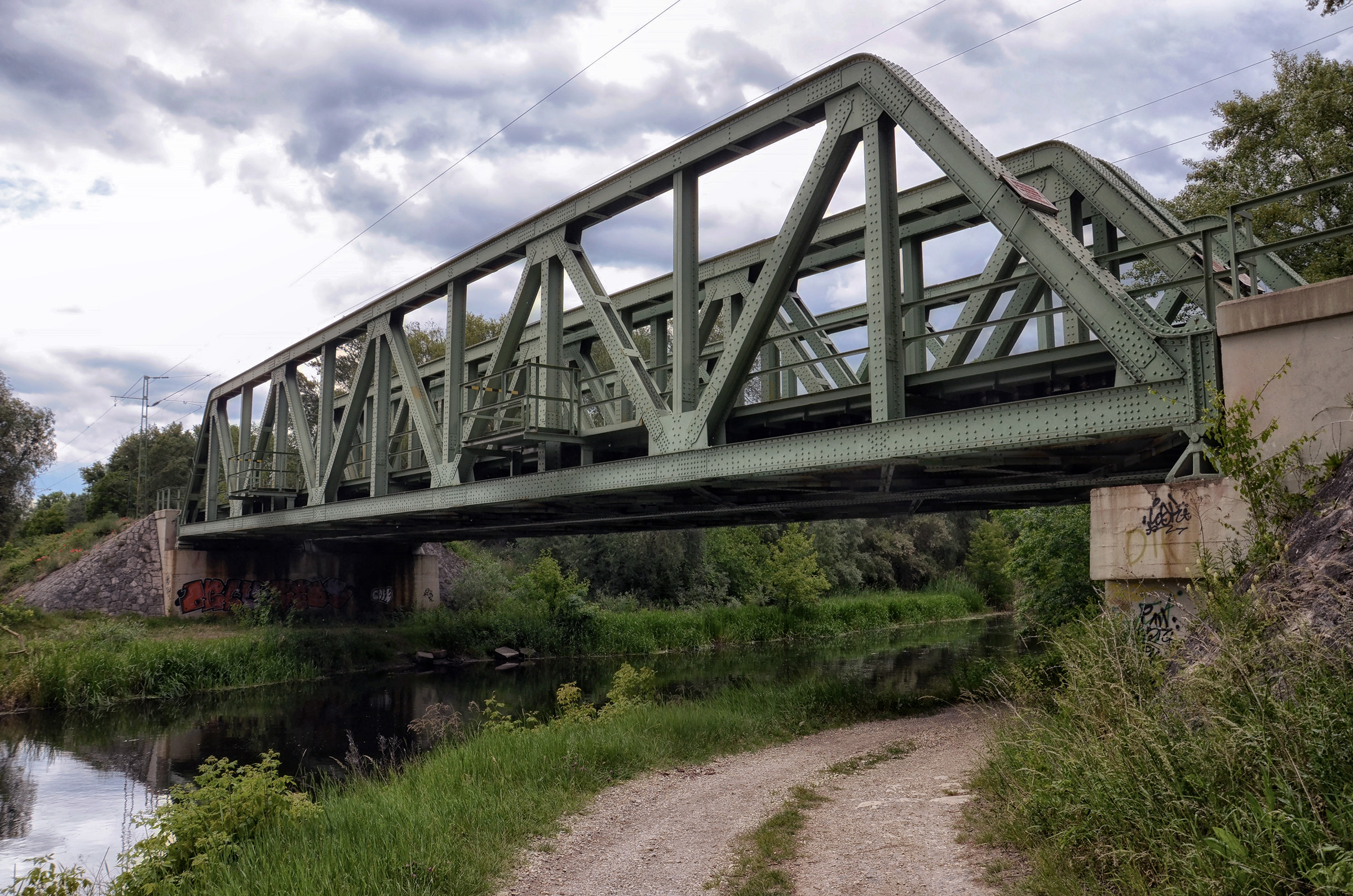 Az abdai vasúti híd a Rábcán